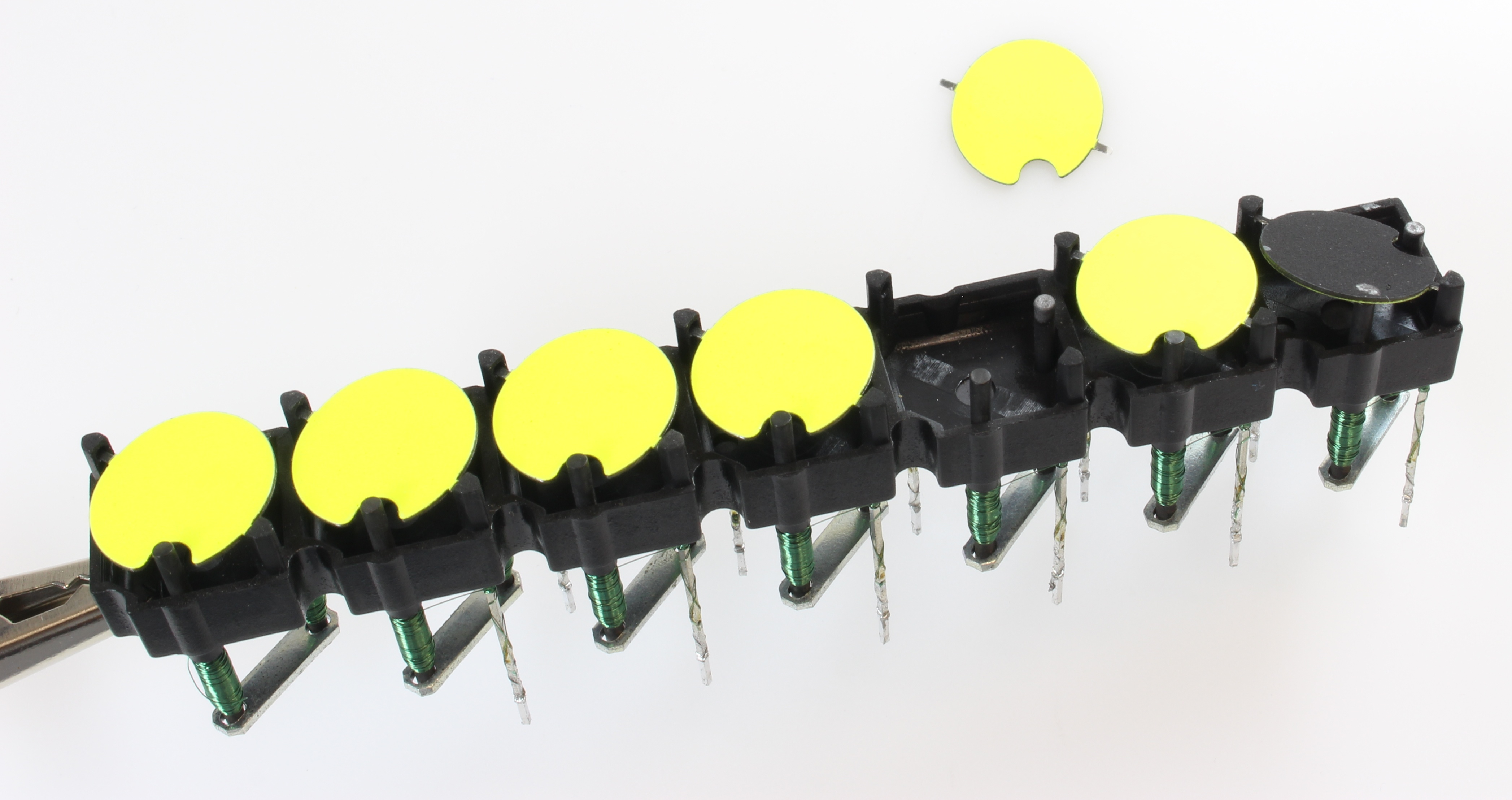 7 gelbe Flipdots. Eins auf schwarz gedreht. Ein ausgebautes Plättchen.